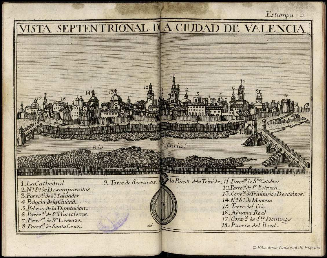 Atlante Español, ó Descripcion general geográfica, cronológica, é histórica de España, por Reynos y Provincias, de sus ciudades, villas... : [tomo VIII: Descripción del Reino de Valencia Parte I] su autor D. Bernardo Espinalt y Garcia... Autor: Espinalt y García, Bernardo Fecha: 1784 Datos de edición: En Madrid en la imprenta de Hilario Santos Alonso